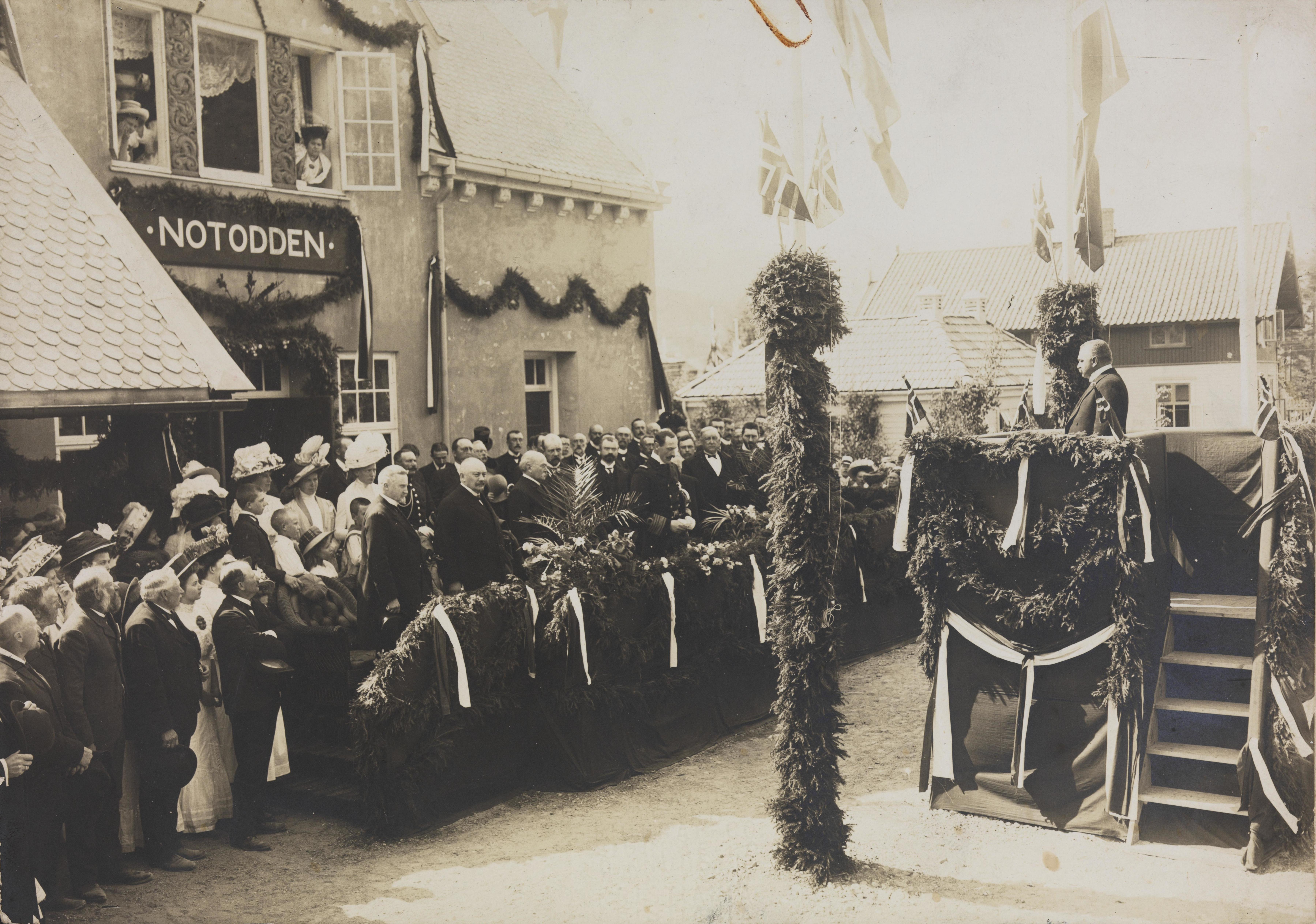 Bildet er hentet fra Nasjonalbibliotekets bildesamling Notodden gamle stasjon, Notodden, Telemark Depicted people: Haakon VII, Gunnar Knudsen and Sam Eyde